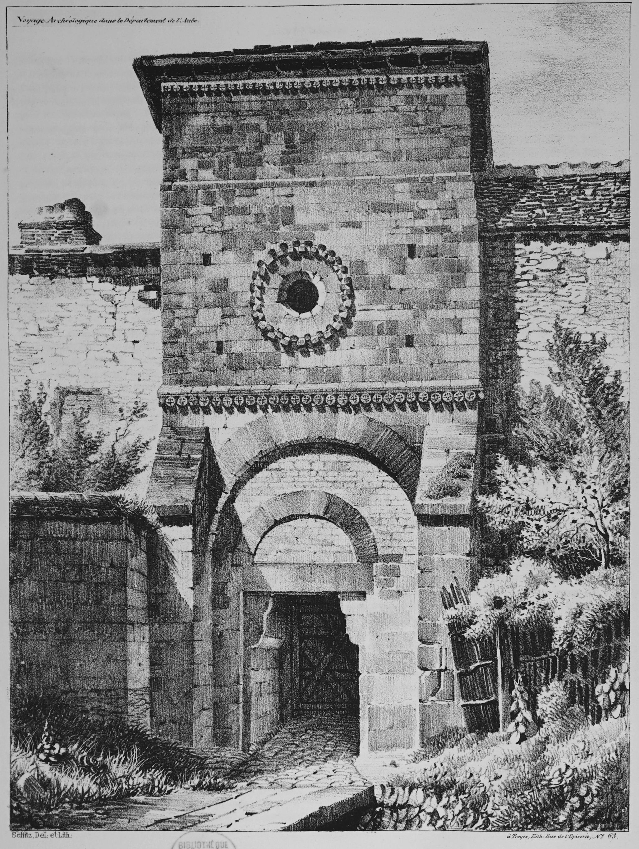 porte de l'ancien château vers le nord.